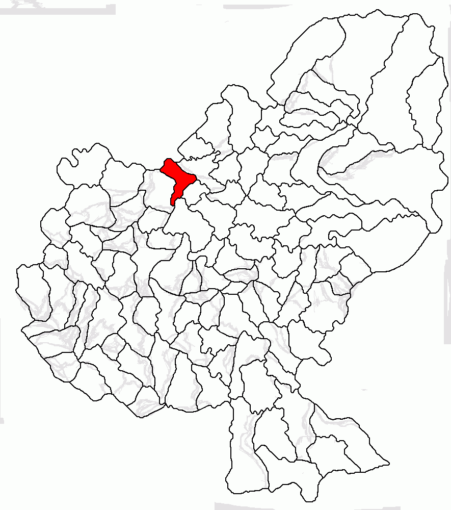 Categorie:Hărţi ale judeţului Mureş